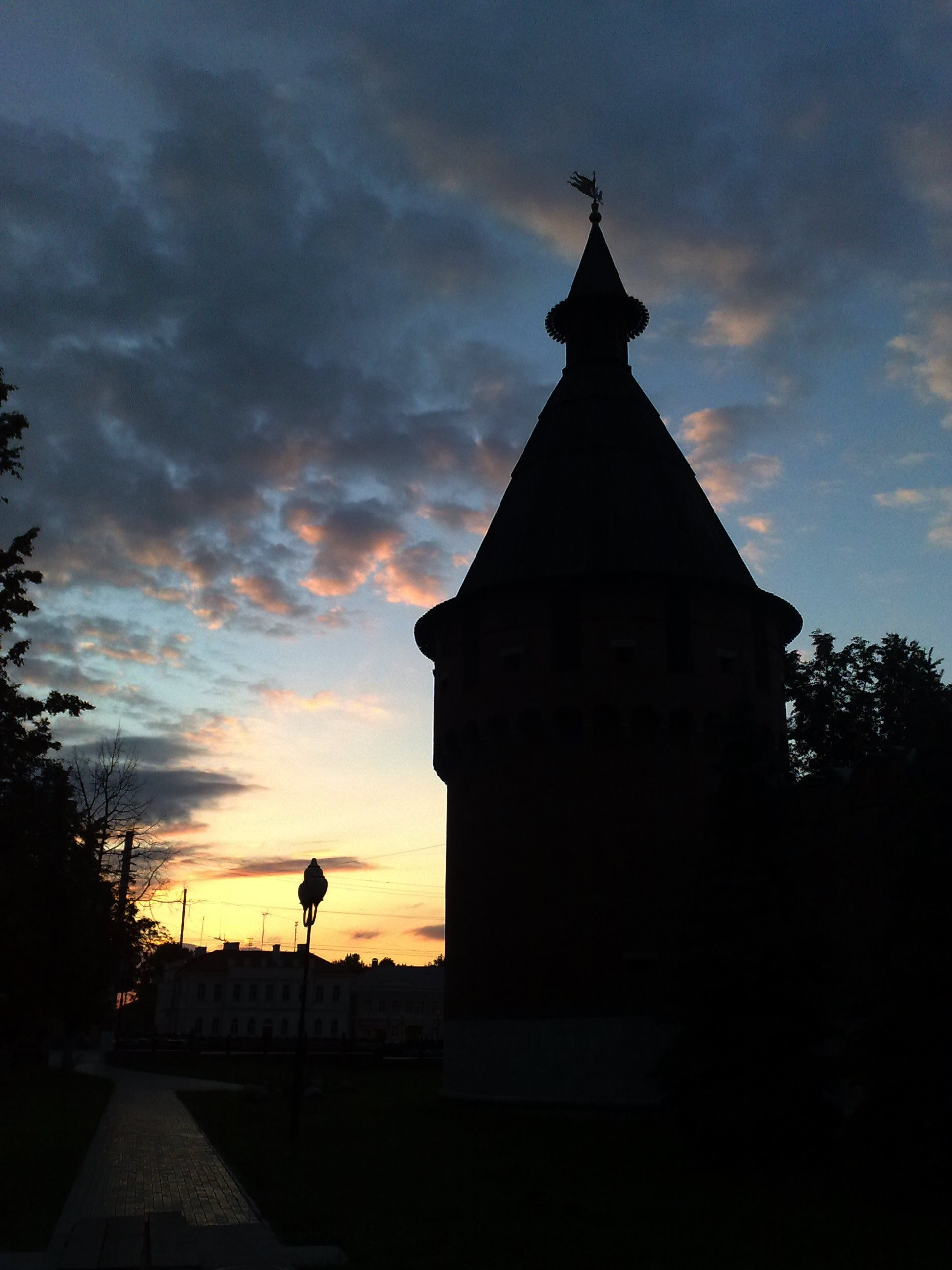 Спасская башня: Кремль, ул. Менделеевская, 8, Тула, Тульская область